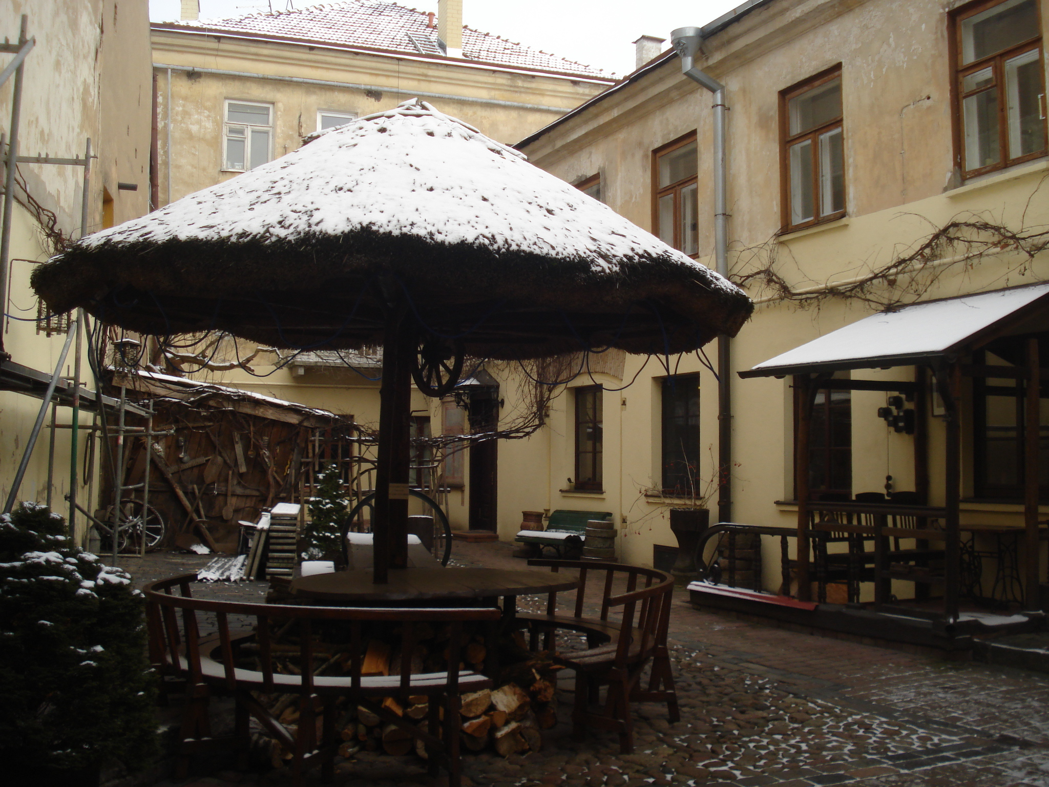 Улица Швянто Миколо 6. Двор (Вильнюс)